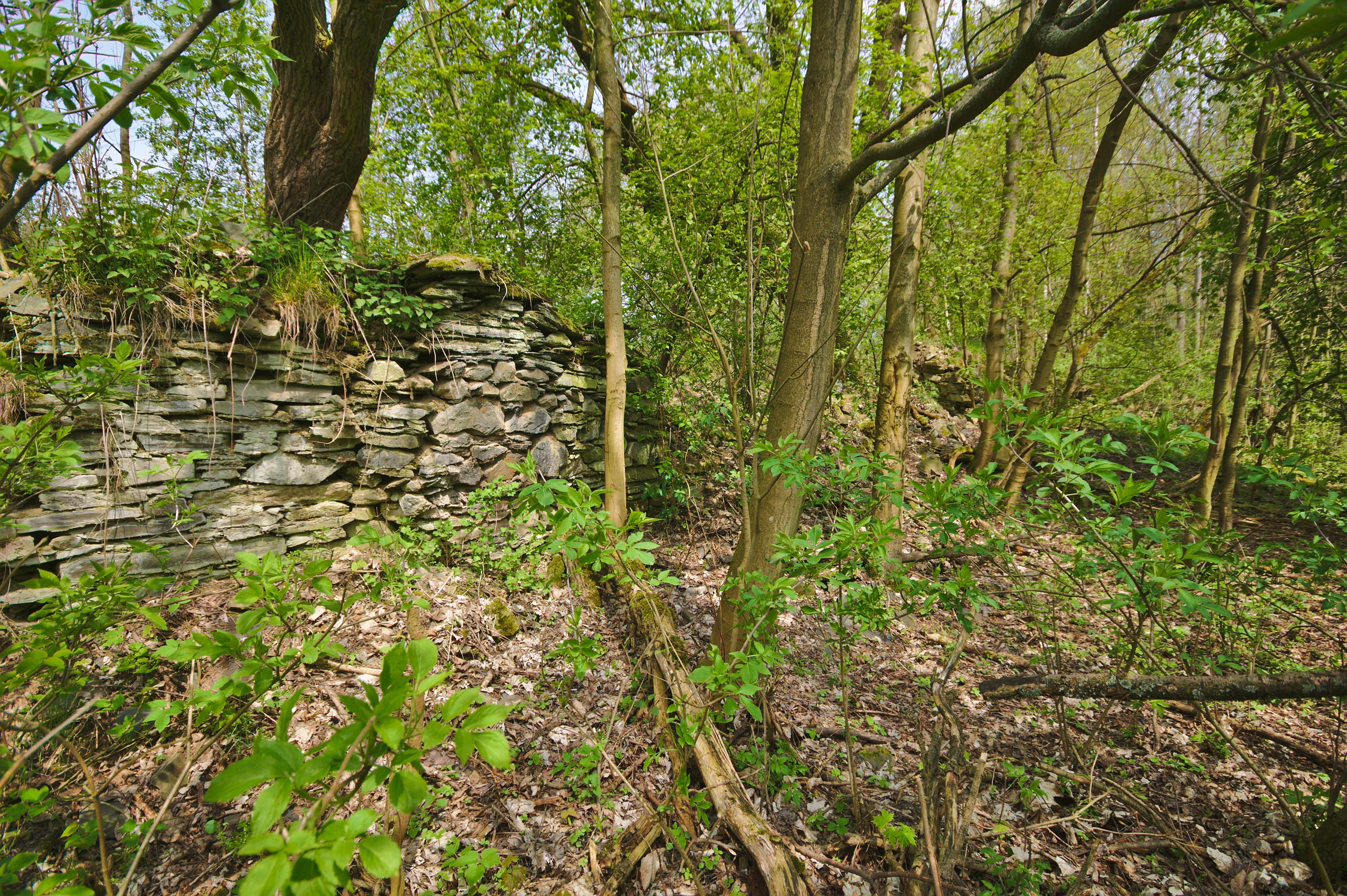 Zaniklá vesnice Bělá, katastr obce Heroltovice, Město Libavá, okres Olomouc